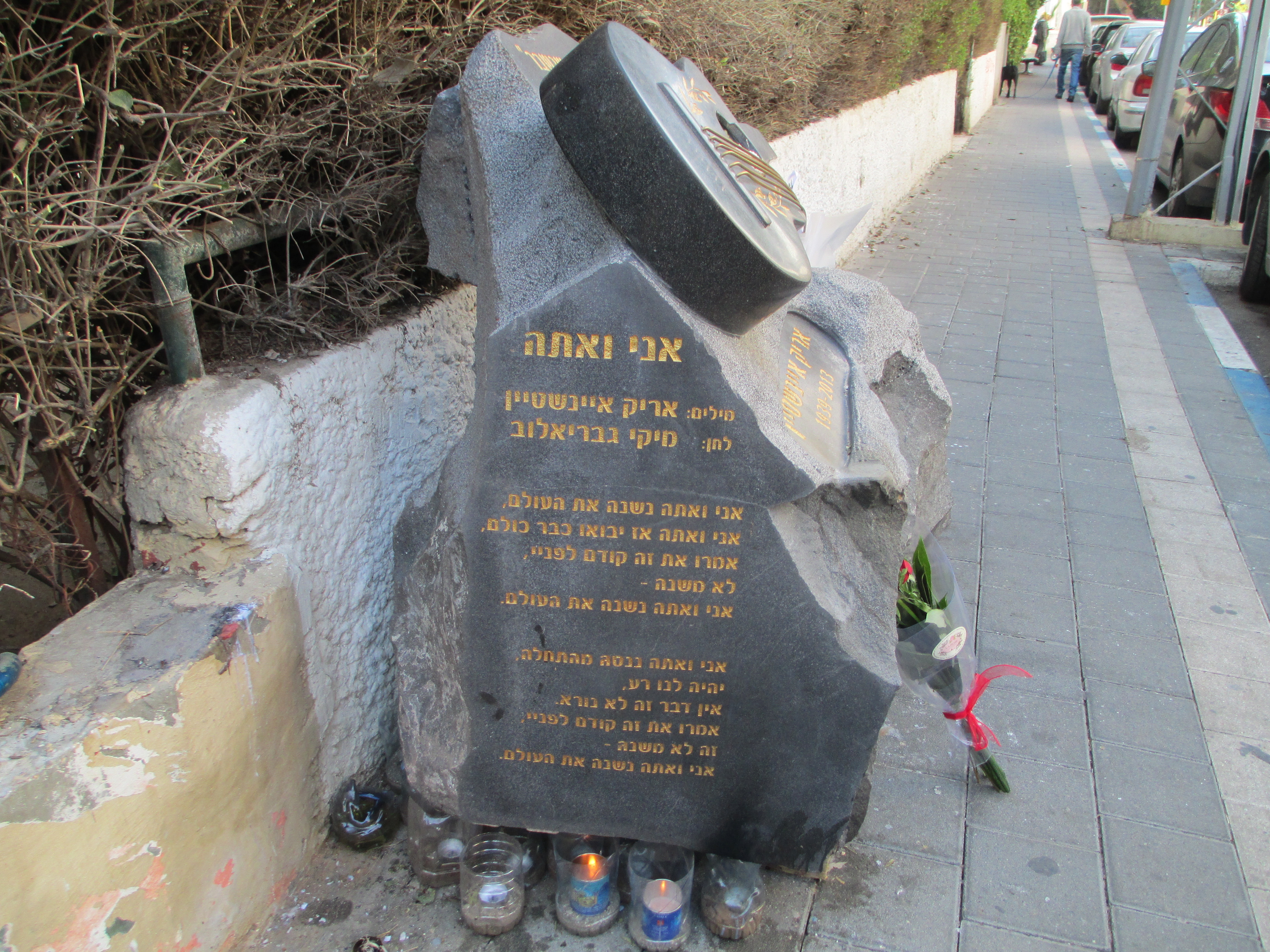 אנדרטה לאריק איינשטיין ליד ביתו ברח' חובבי ציון 40 בתל אביב